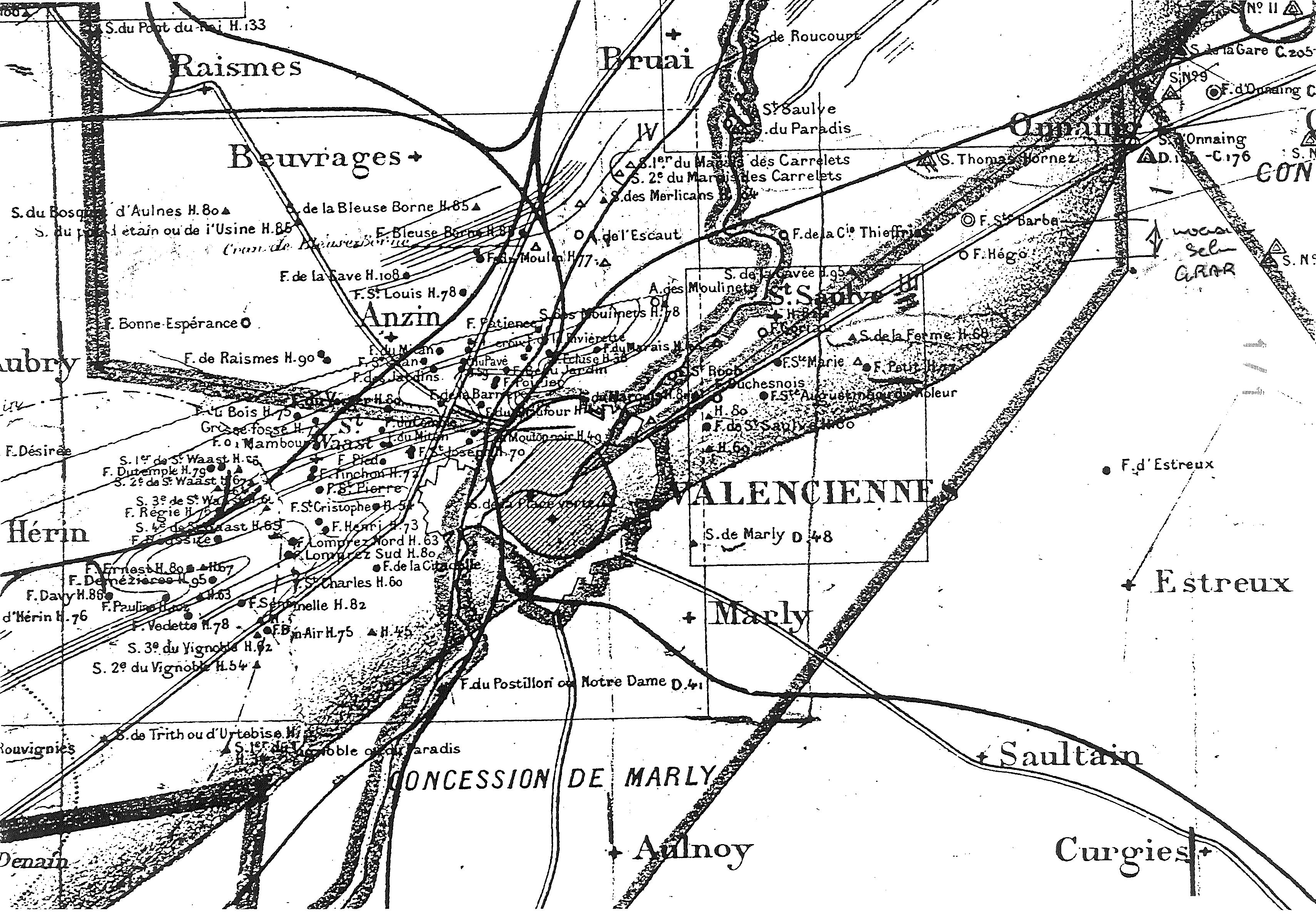 Carte des concessions des compagnies minières d'Anzin et de Marly.